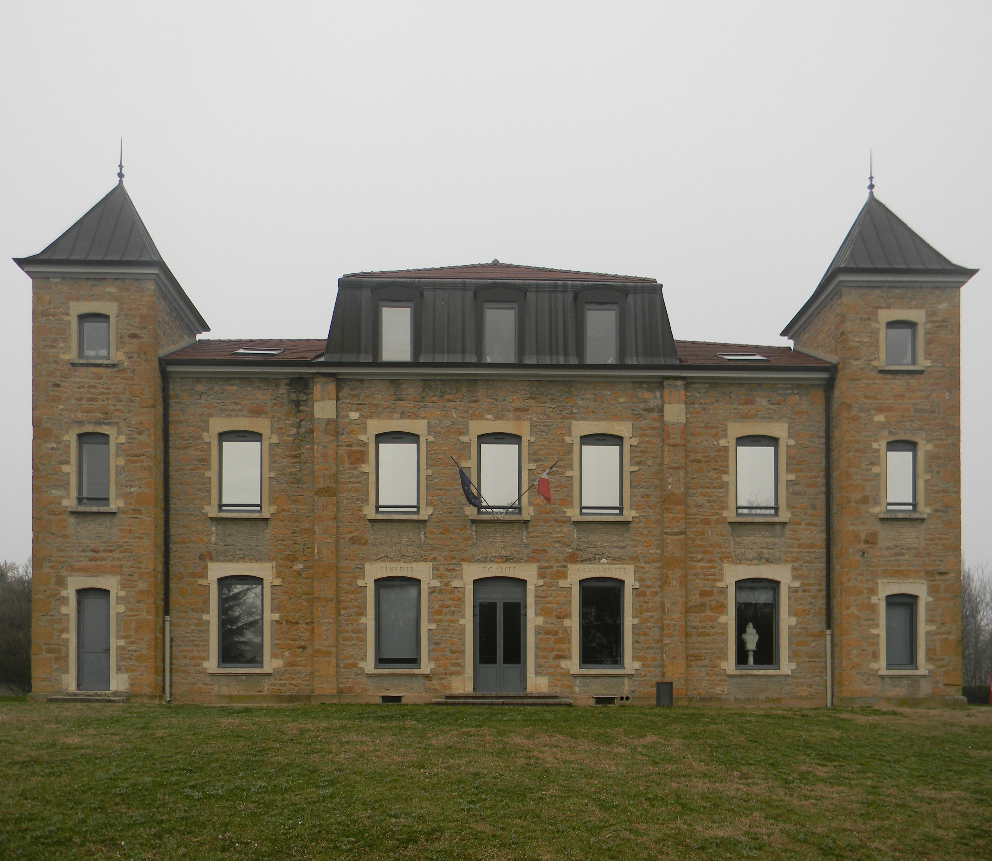 Hôtel de ville de Rillieux-la-Pape.